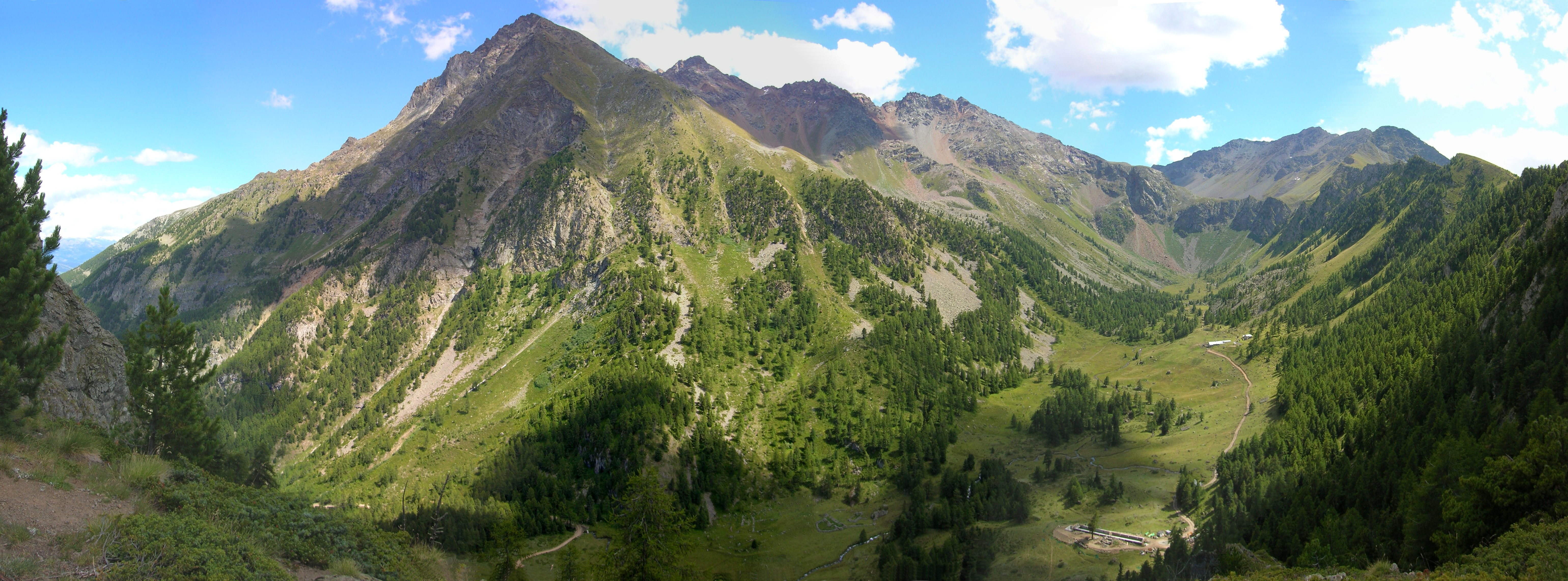 Becca di Nona e Vallone di Comboé visti dal Colle Plan Fenetre, Valle d'Aosta, Italia.